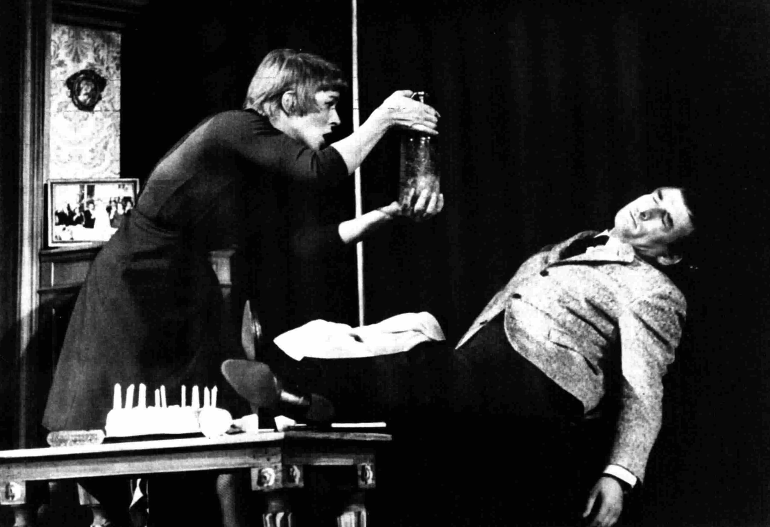 Gli attori Delia Scala e Renato Rascel nella commedia musicale italiana 'Il giorno della tartaruga' - 1965